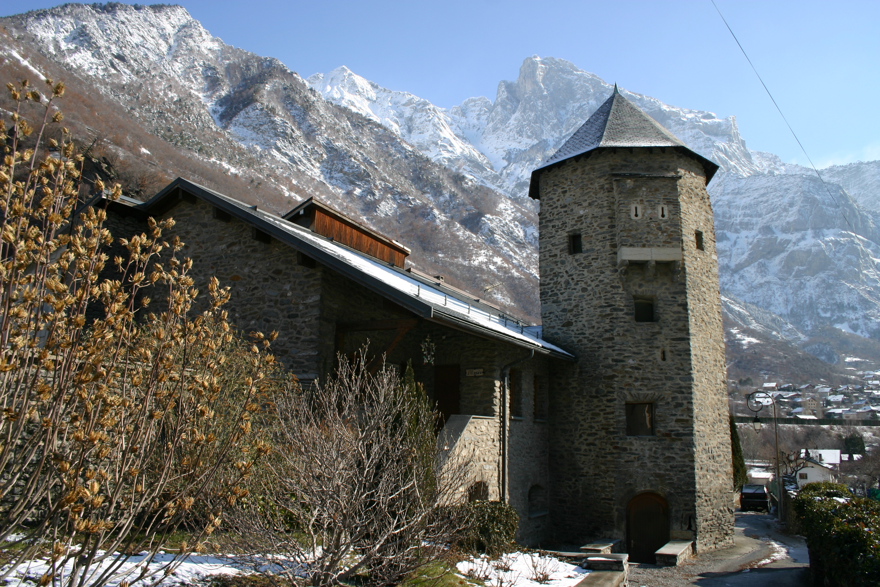 La tour de Saint Julien Montdenis Licensing Auteur : Modesto Alexandre